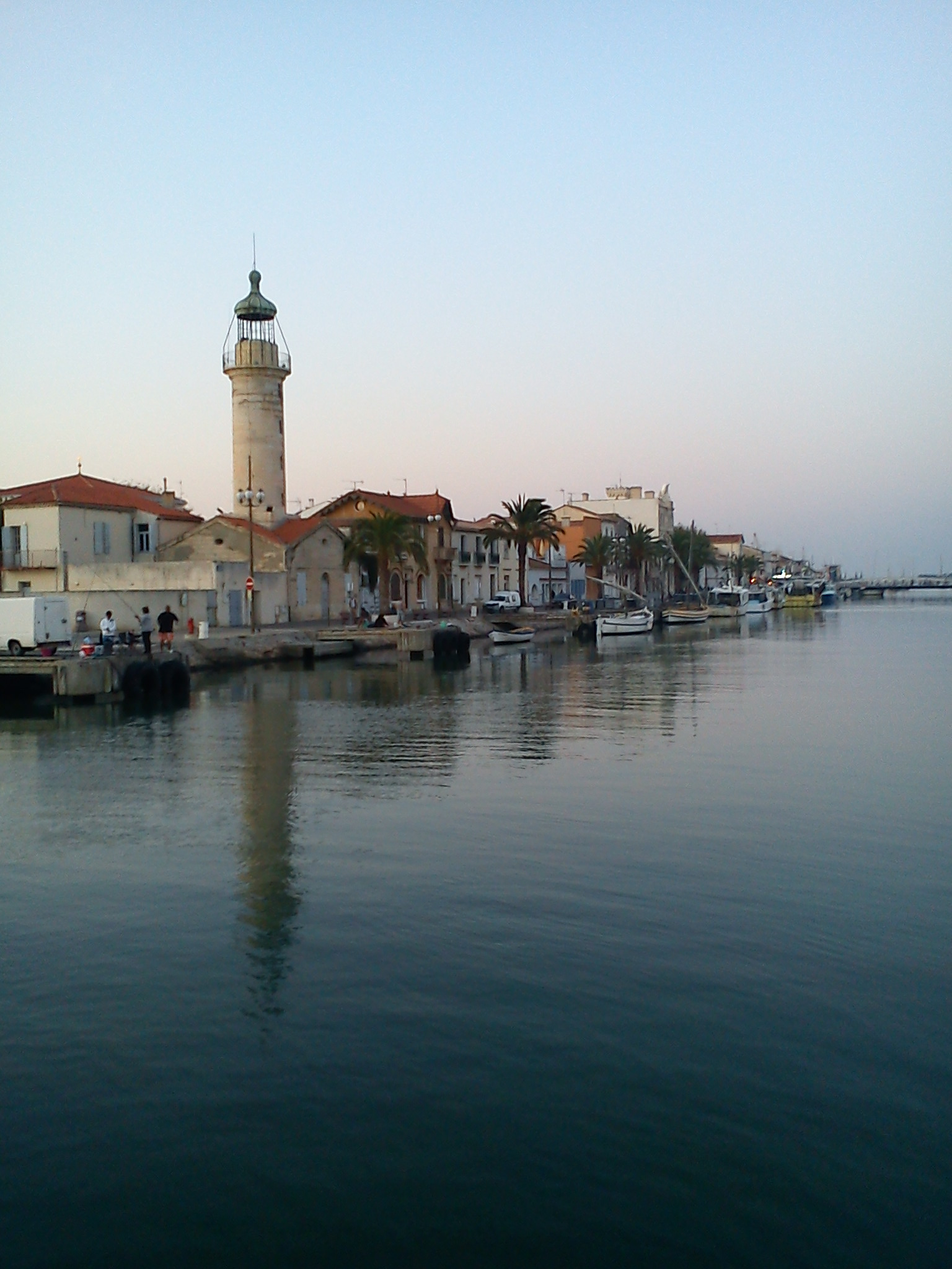 Le grau du roi